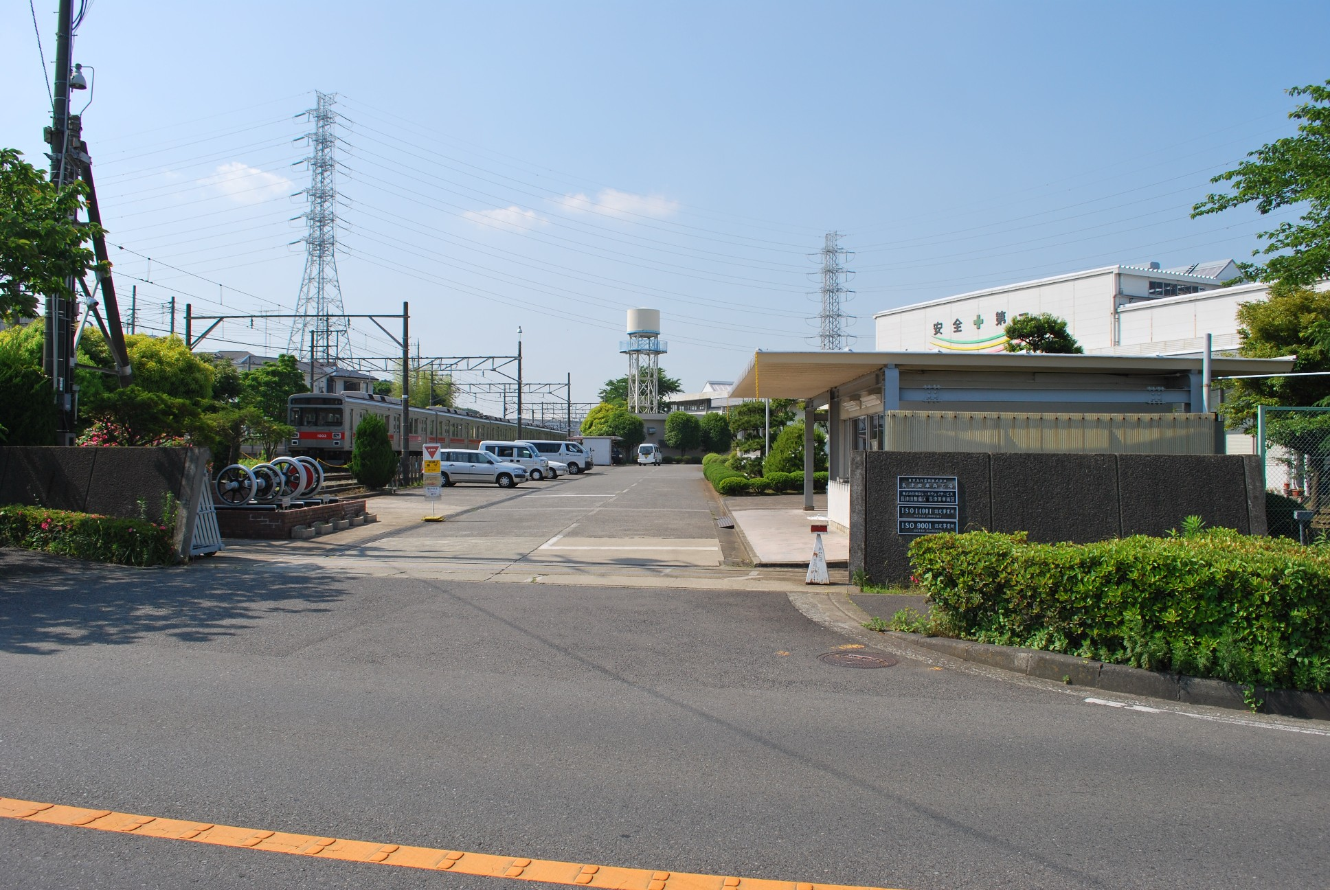 東京急行電鉄長津田車両工場・東急レールウェイサービス長津田整備区